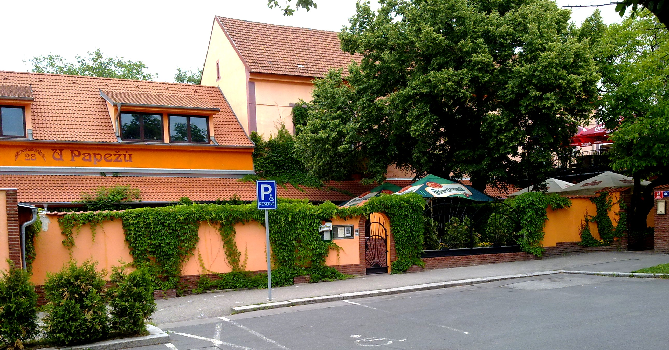 Starochodovská 28/64 bývalé kino Chodov a vinárna u Izidora. Dnes objekt restaurace a vinárny u Papežů